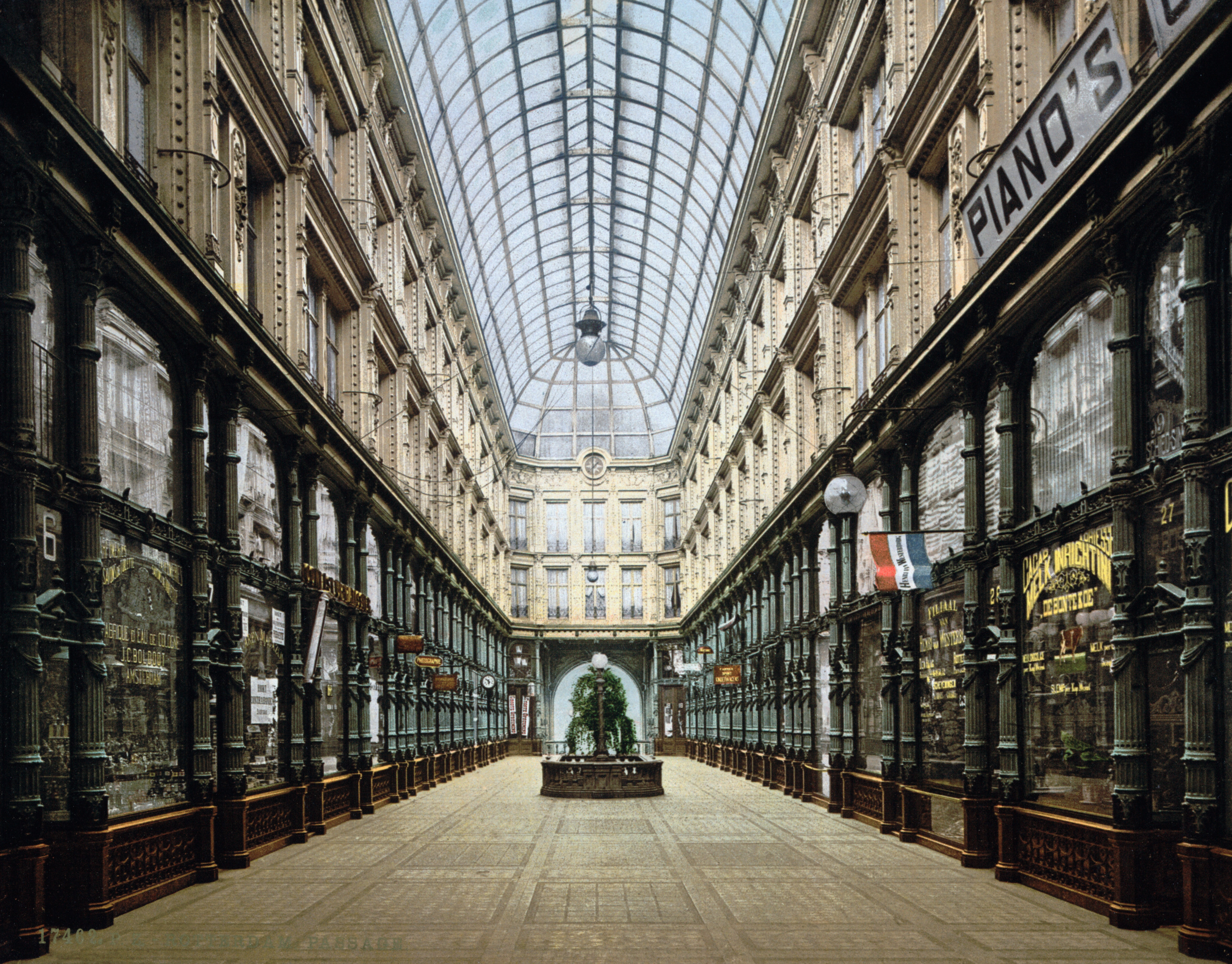 Rotterdam - Arcade, beter bekend als De Passage